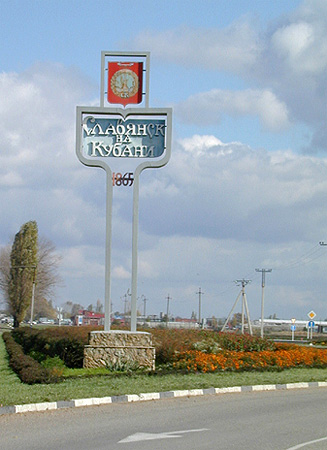 Один из въездов в г.Славянск-на-Кубани